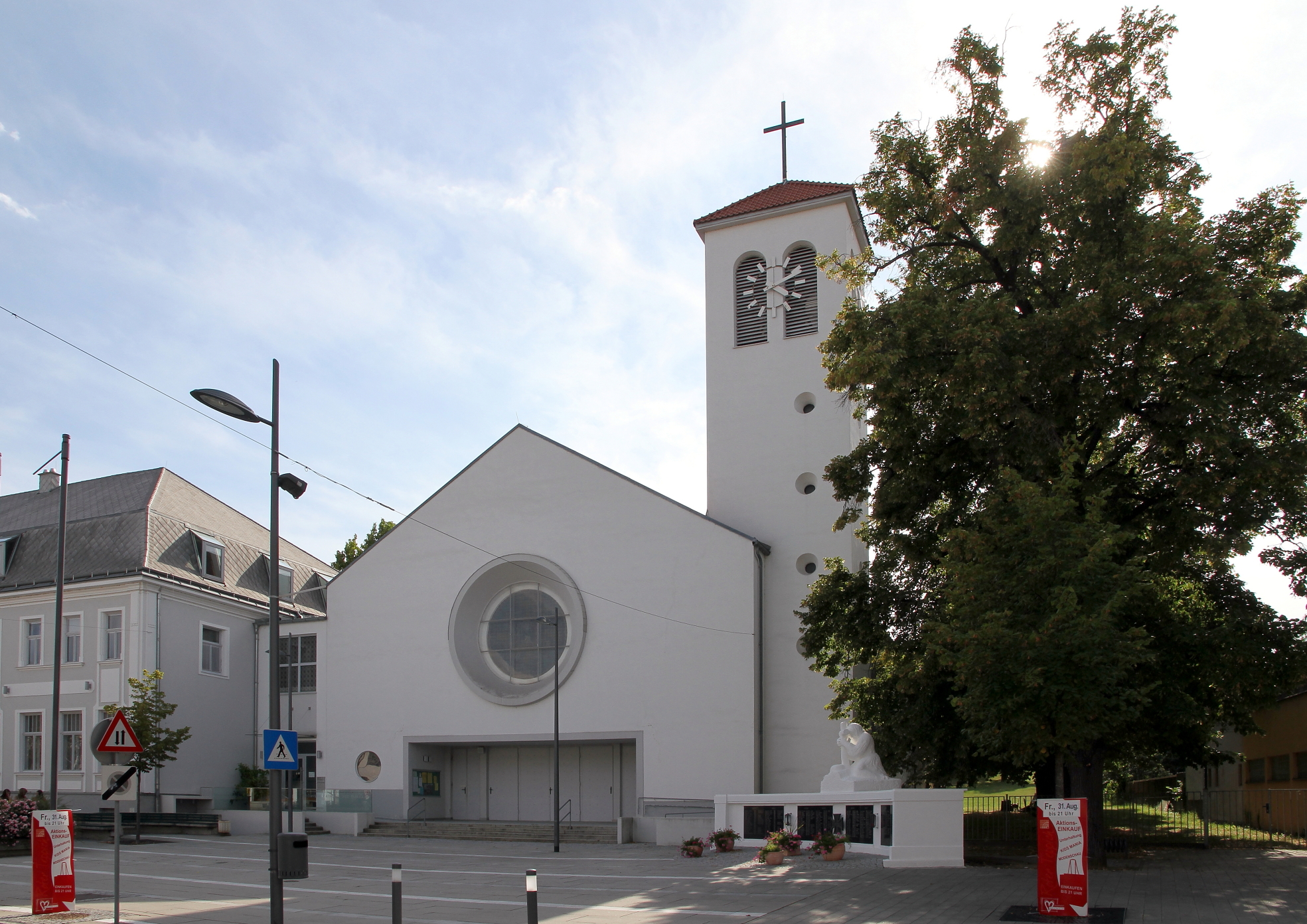 Die katholische Pfarrkirche hl. Clemens Maria Hofbauer der burgenländischen Bezirkshauptstadt Oberpullendorf. Die Kirche wurde 1935 erbaut und ist dem Clemens Maria Hofbauer geweiht.